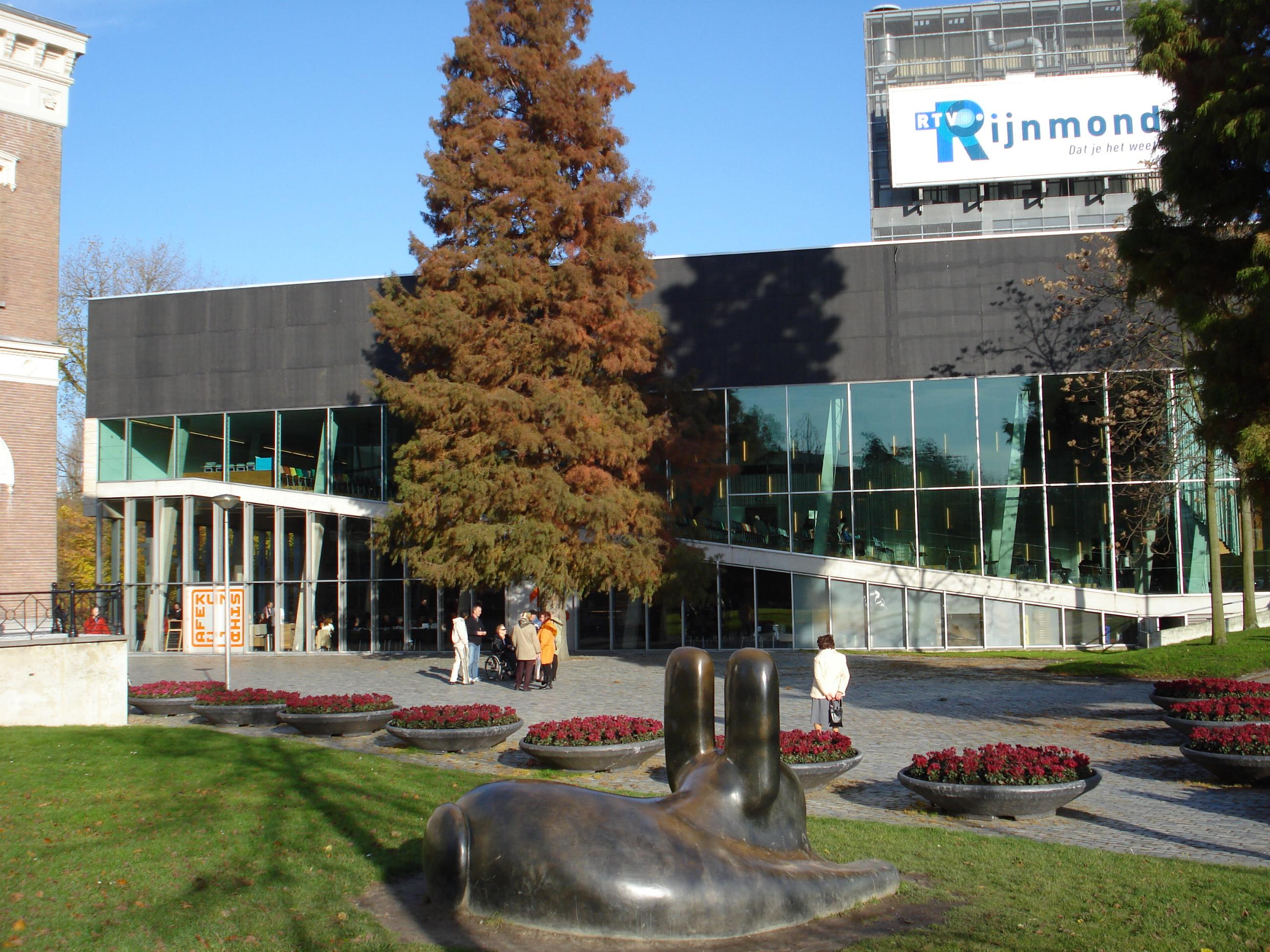 Rotterdam, westzijde Kunsthal.